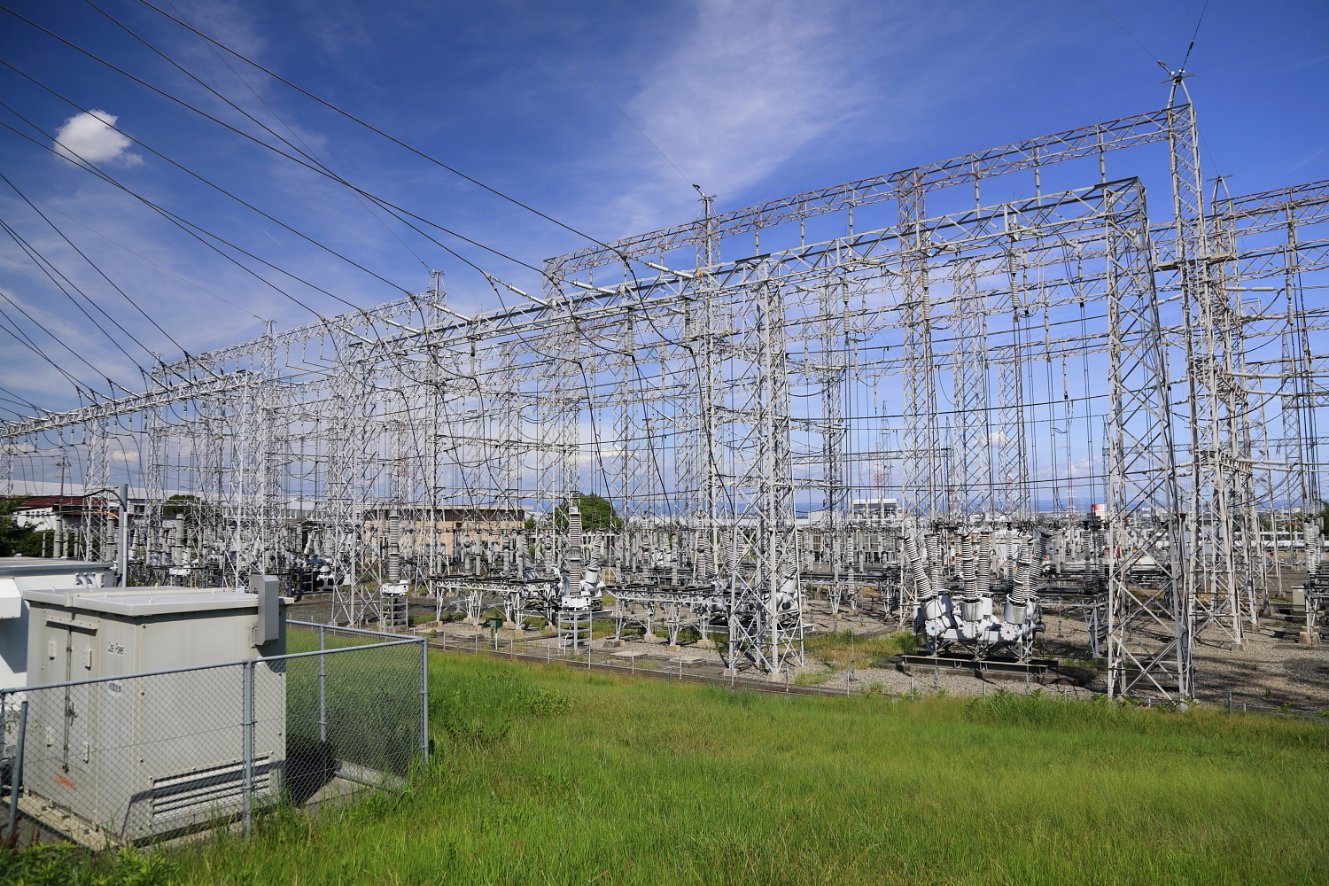 中部電力東名古屋変電所（2018年（平成30年）7月）。